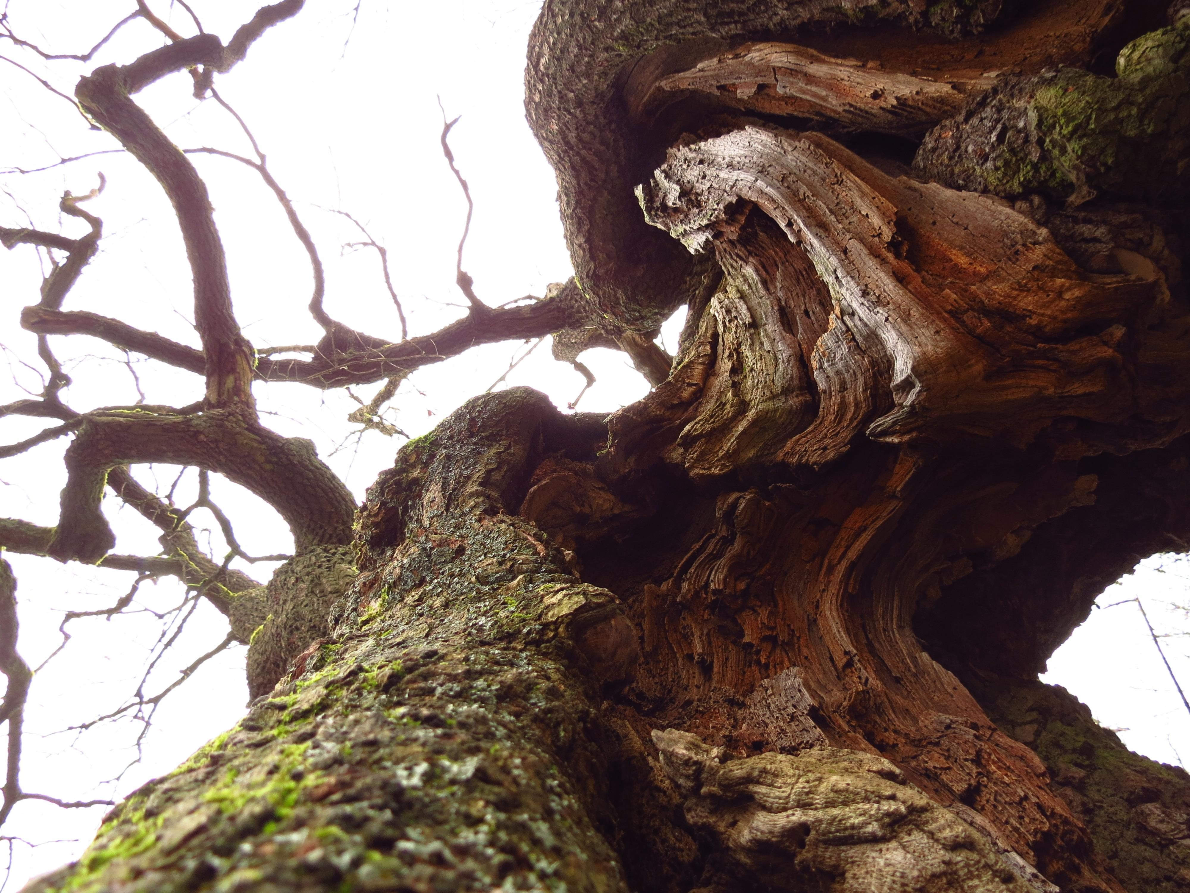 Betteleiche im Hainch, Detailansicht.